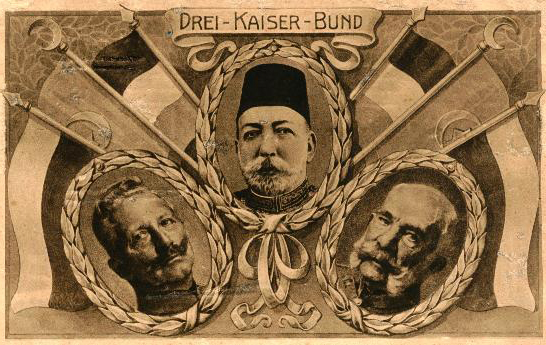 Drei Kaiser BundTürkçe: Birinci Dünya Savaşı döneminde Almanya, Osmanlı İmparatorluğu ve Avusturya-Macaristan İmparatorluğu'nun ittifakını gösteren bir afiş. Üzerinde Almanca "üç imparatorun ittifakı" yazıyor.